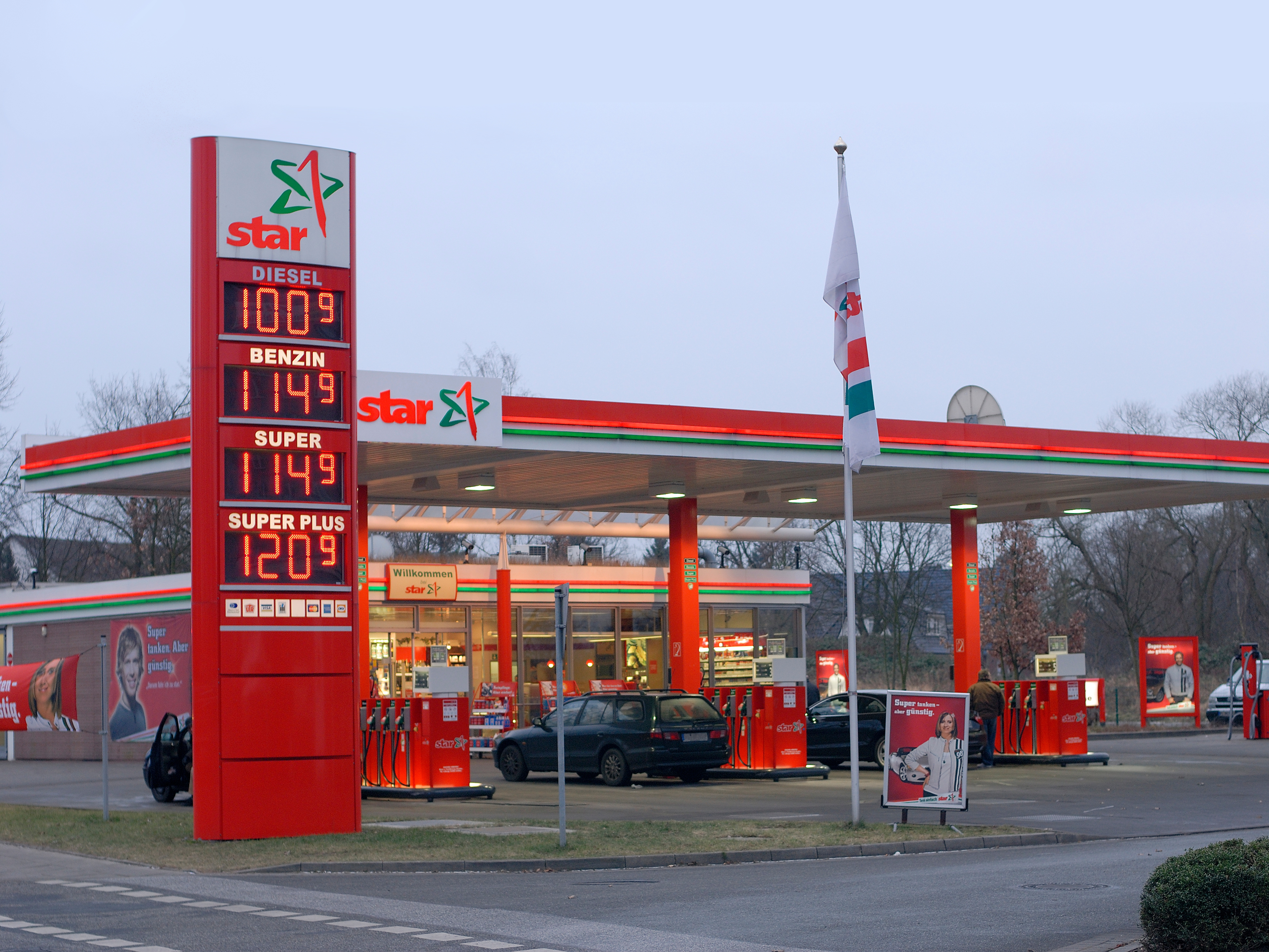 Star Tankstelle in Deutschland